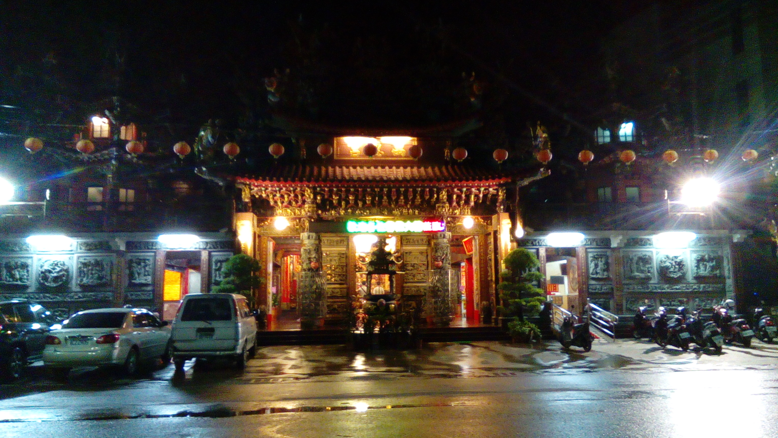 位於萬丹國小旁